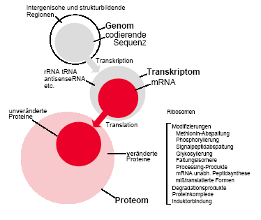 Das Proteom als Resultat der Genexpression und nachfolgenden Modifikation der entstandenen Proteinmoleküle. (Bildautor --Caspardavid 22:48, 1. Feb 2005 (CET))